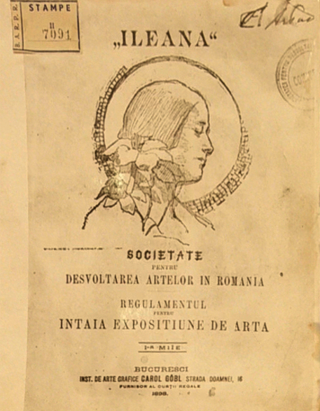 Societatea Ileana - Regulamentul expozitiei internationale 1898